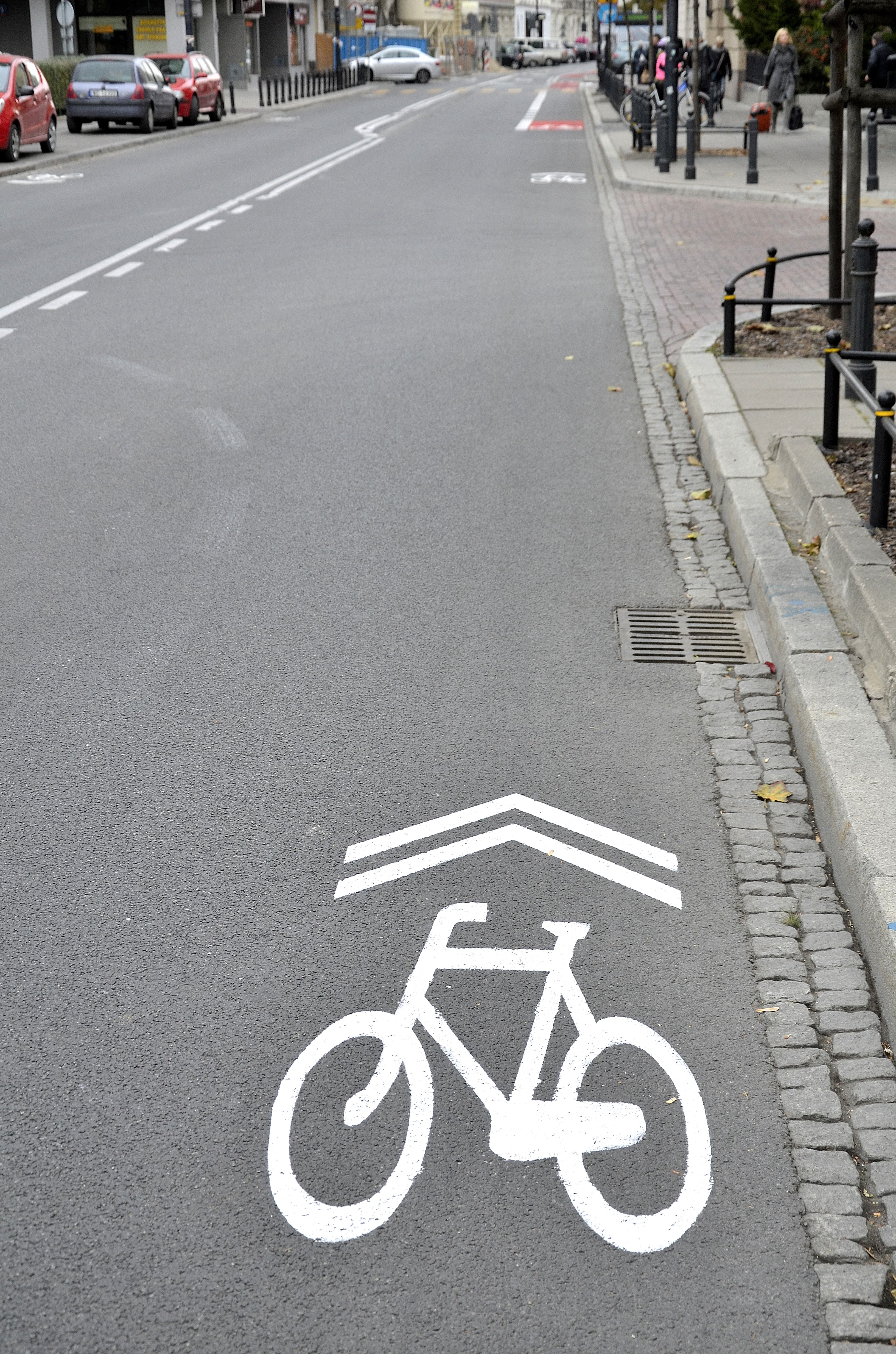 Znak P-27 kierunek i tor ruchu roweru (tzw. sierżant rowerowy) na ul. Wiejskiej w Warszawie